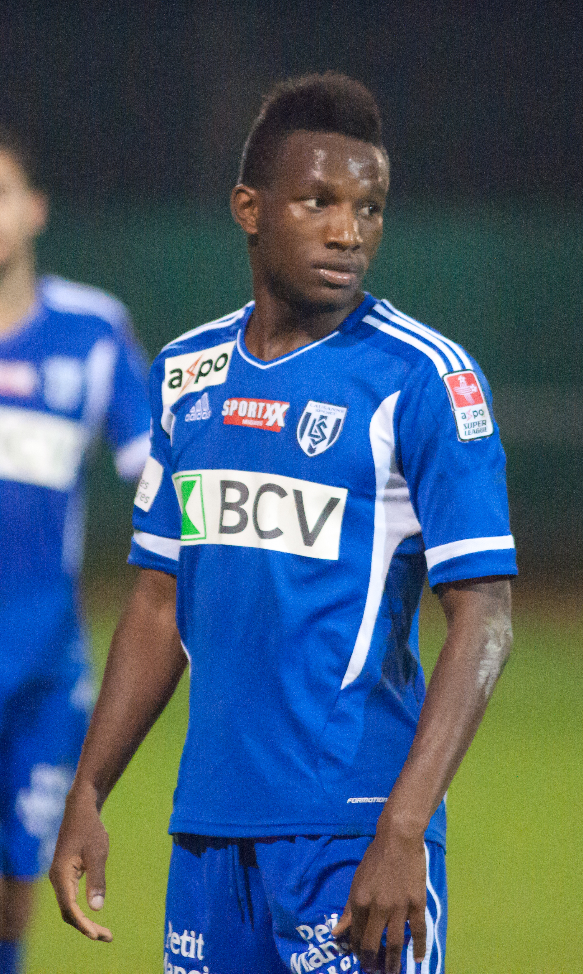 Gaël Nlundulu avec le Lausanne Sport.